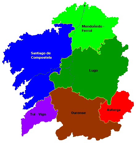 Wikipedia:LicenzaMapaSobreira